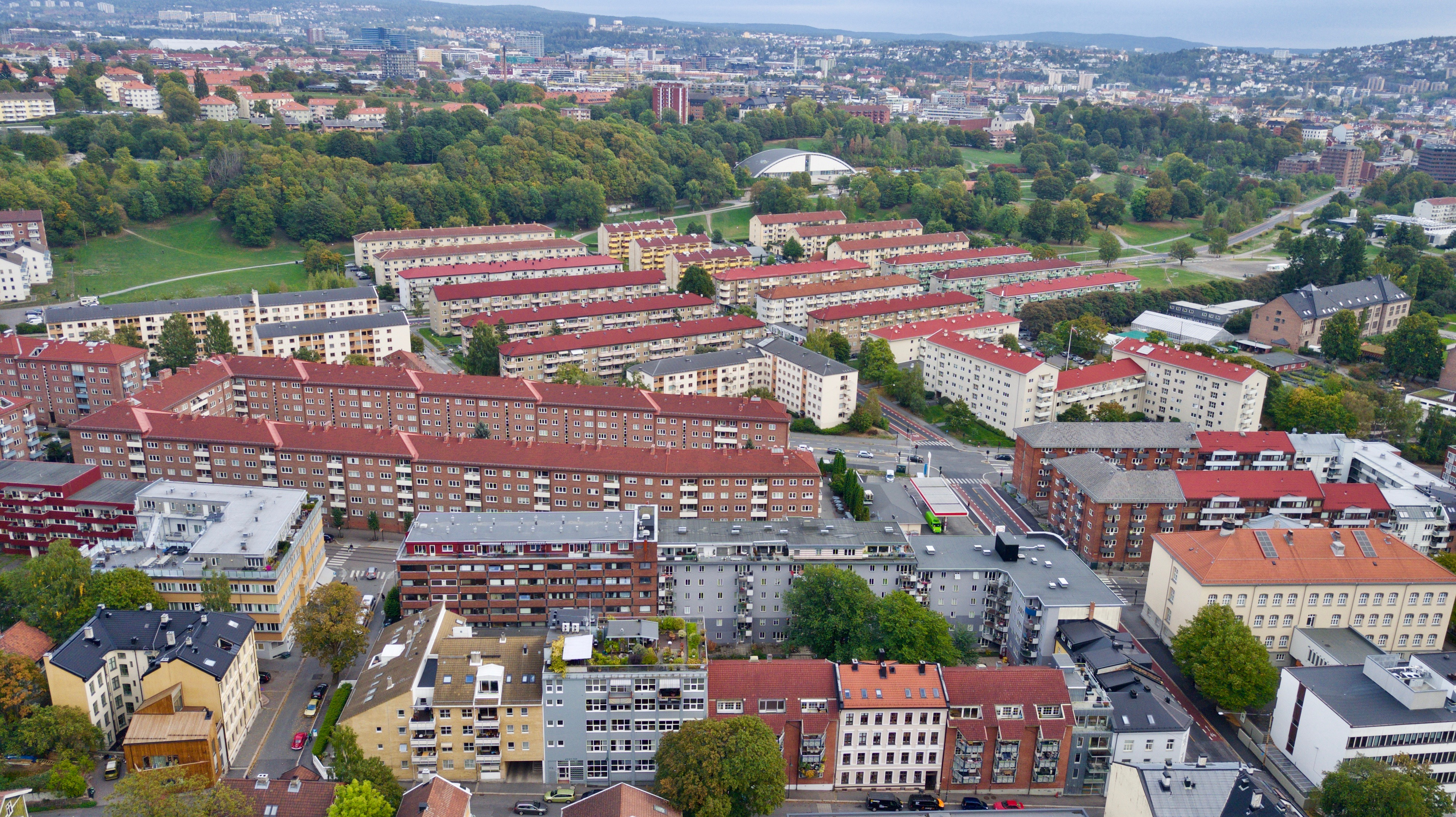 Sofienberg, Tøyenbadet, Tøyenparken. Oslo.